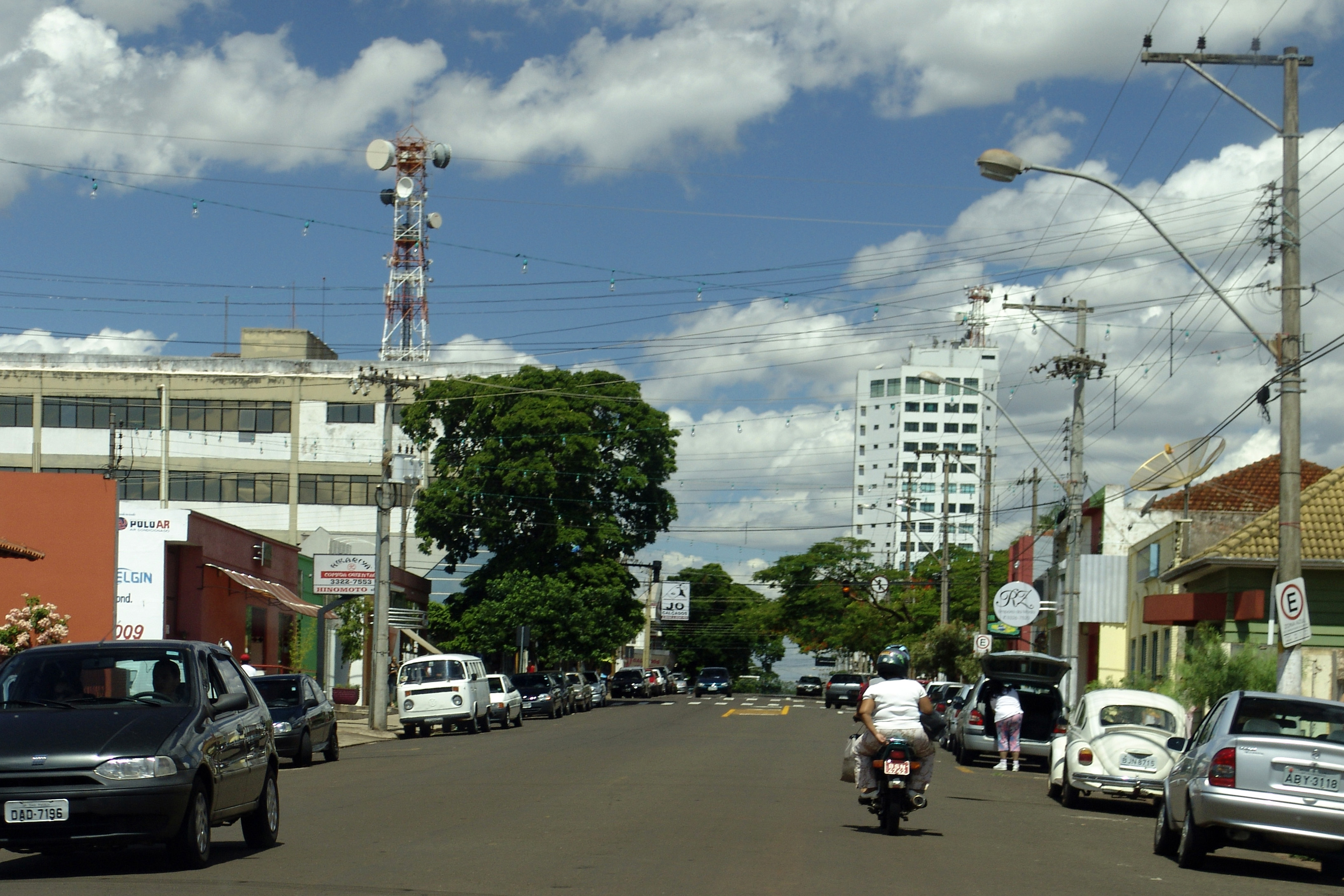 Vista do município de ptOurinhos, São Paulo, Brasil